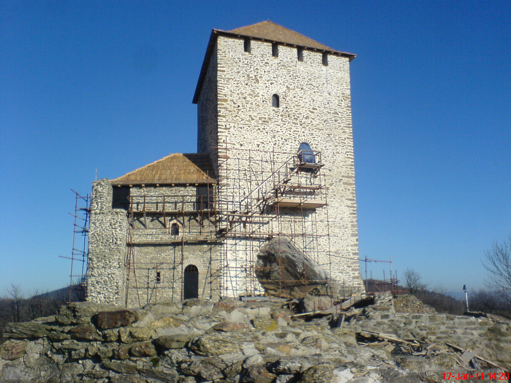 Реконструкција Вршачког замка Licensing